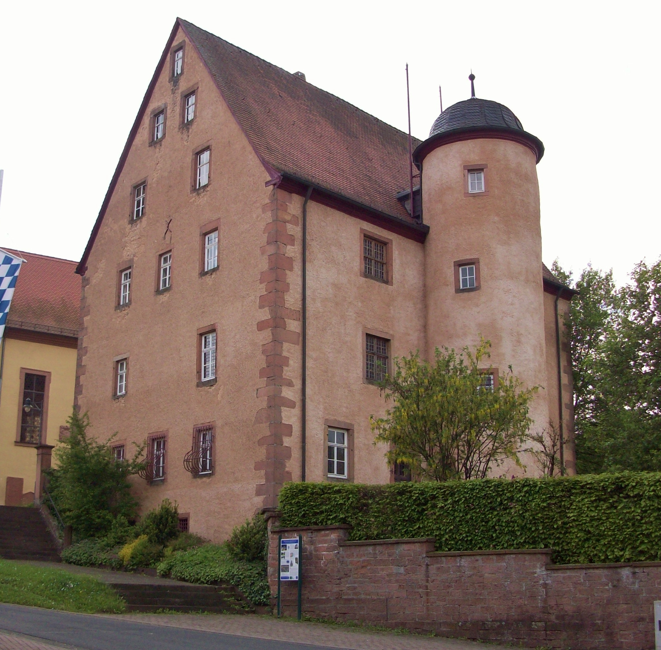 Schloss Wiesen im Landkreis Aschaffenburg in Unterfranken